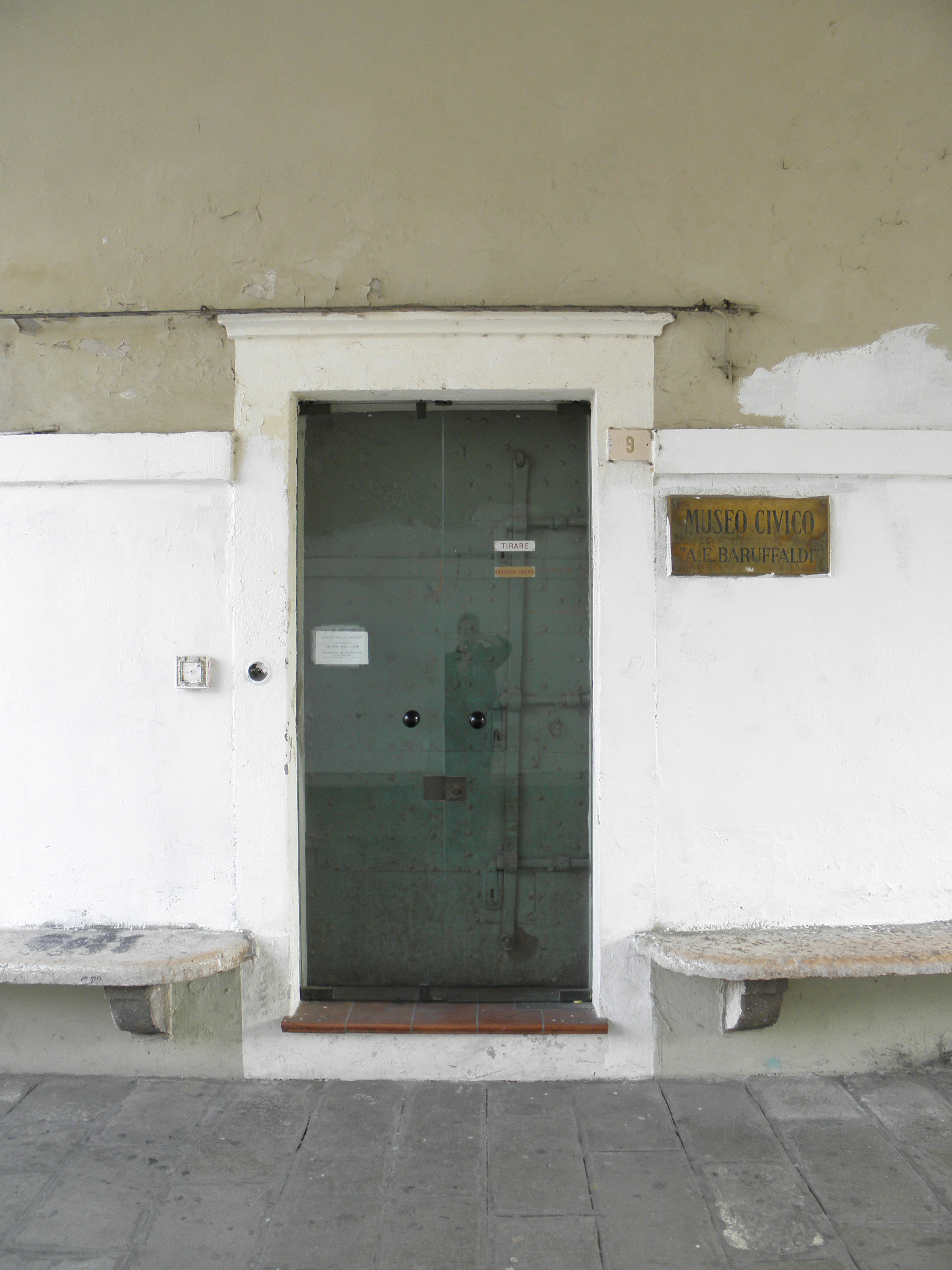 Badia Polesine, Museo Civico Antonio Eugenio Baruffaldi: l'ingresso al museo sito nel Palazzo ex Monte dei Pegni.